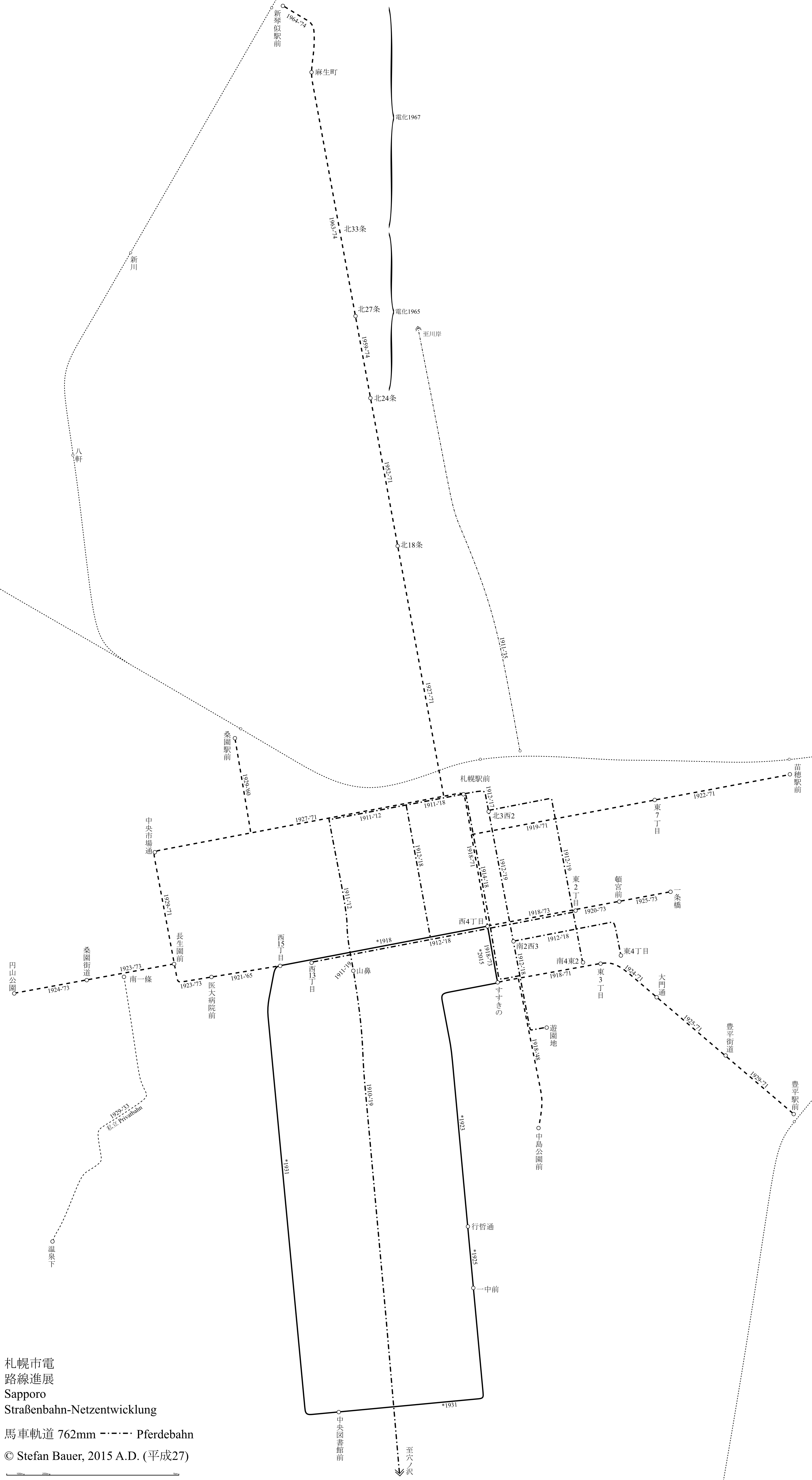 札幌市電の路線進展図